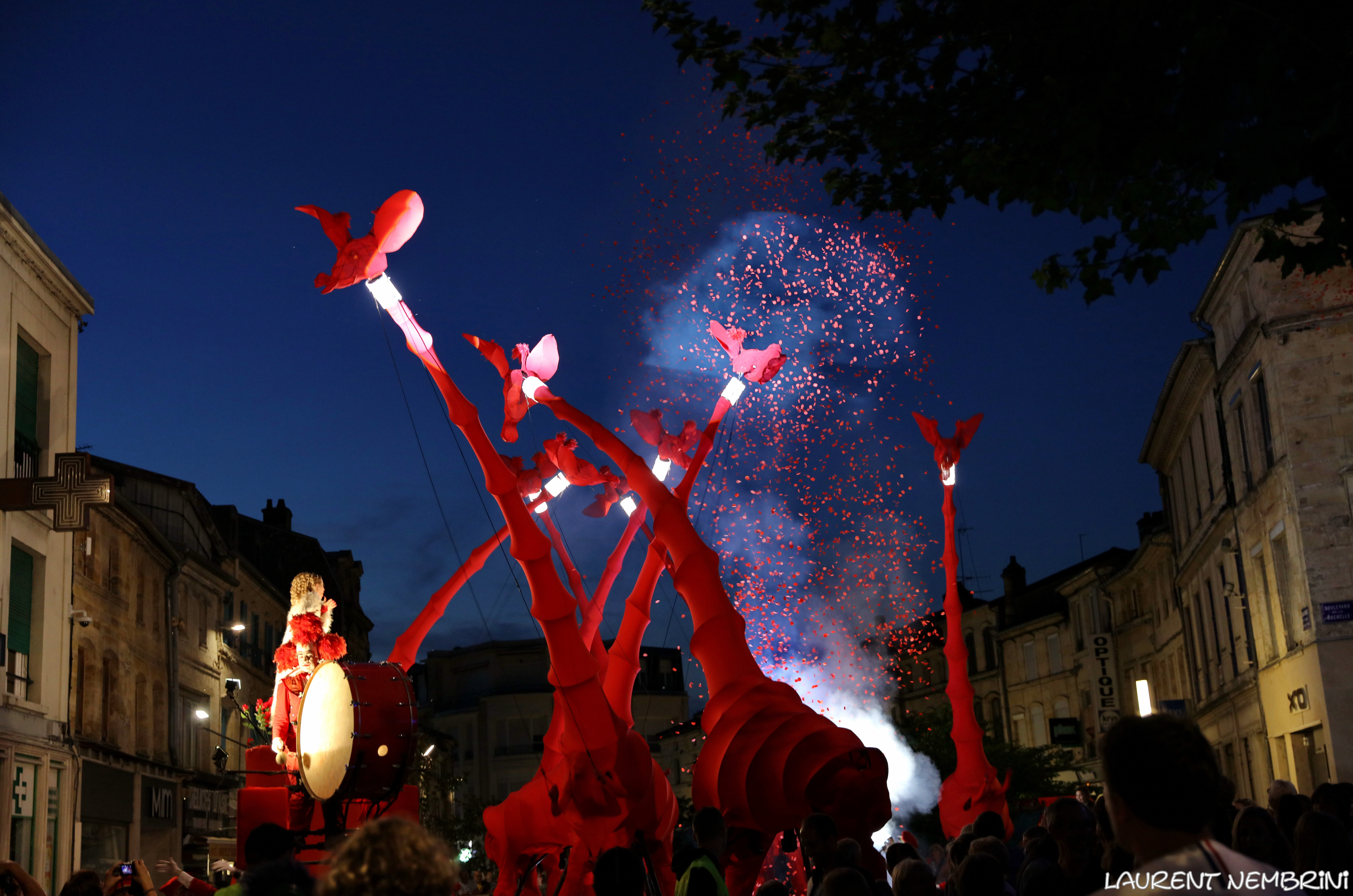 Ouverture de l'édition 2018